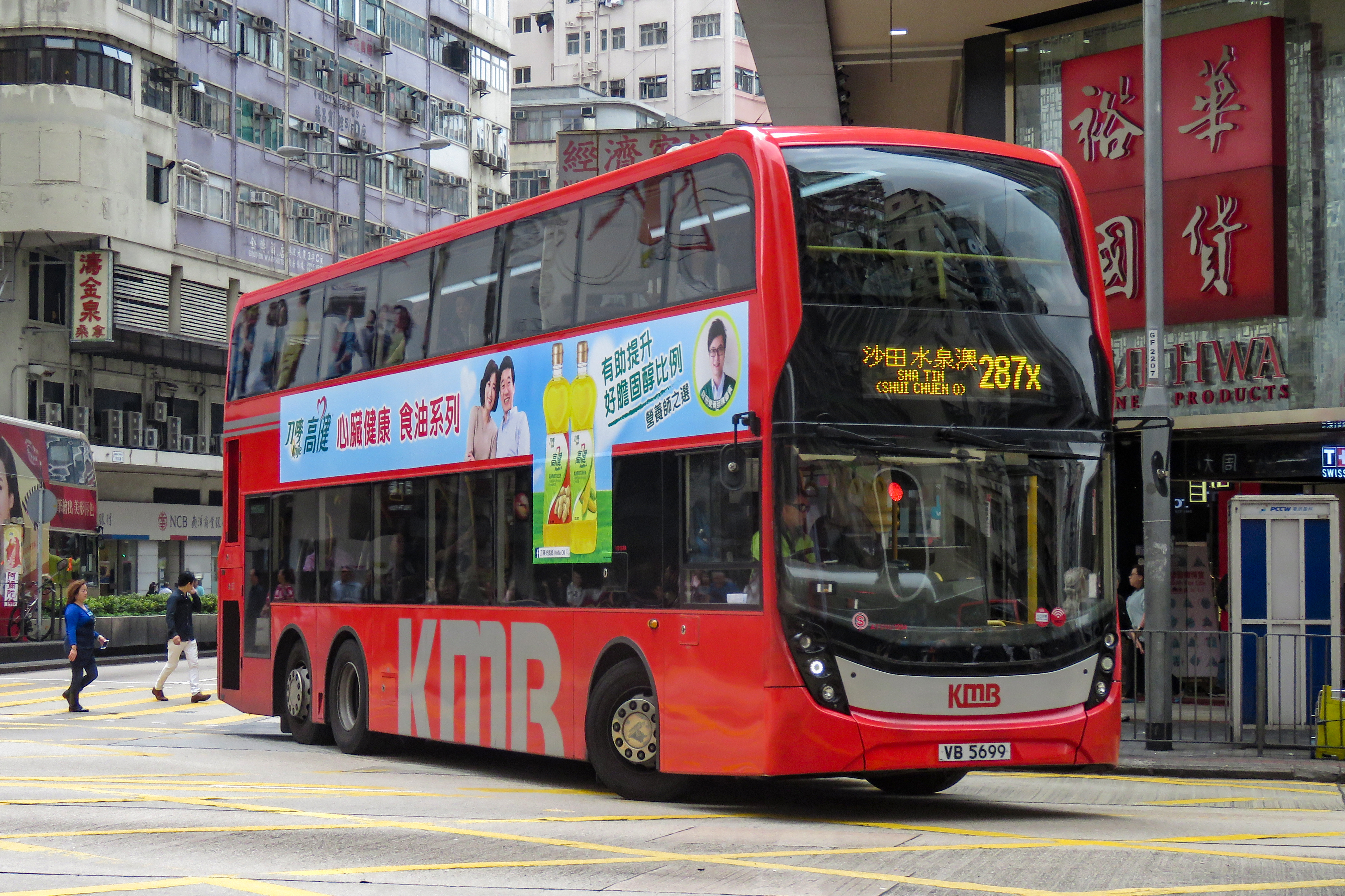 287X線用車ATENU1254 (車牌VB5699) 正從佐敦道東行轉向彌敦道北行返回沙田